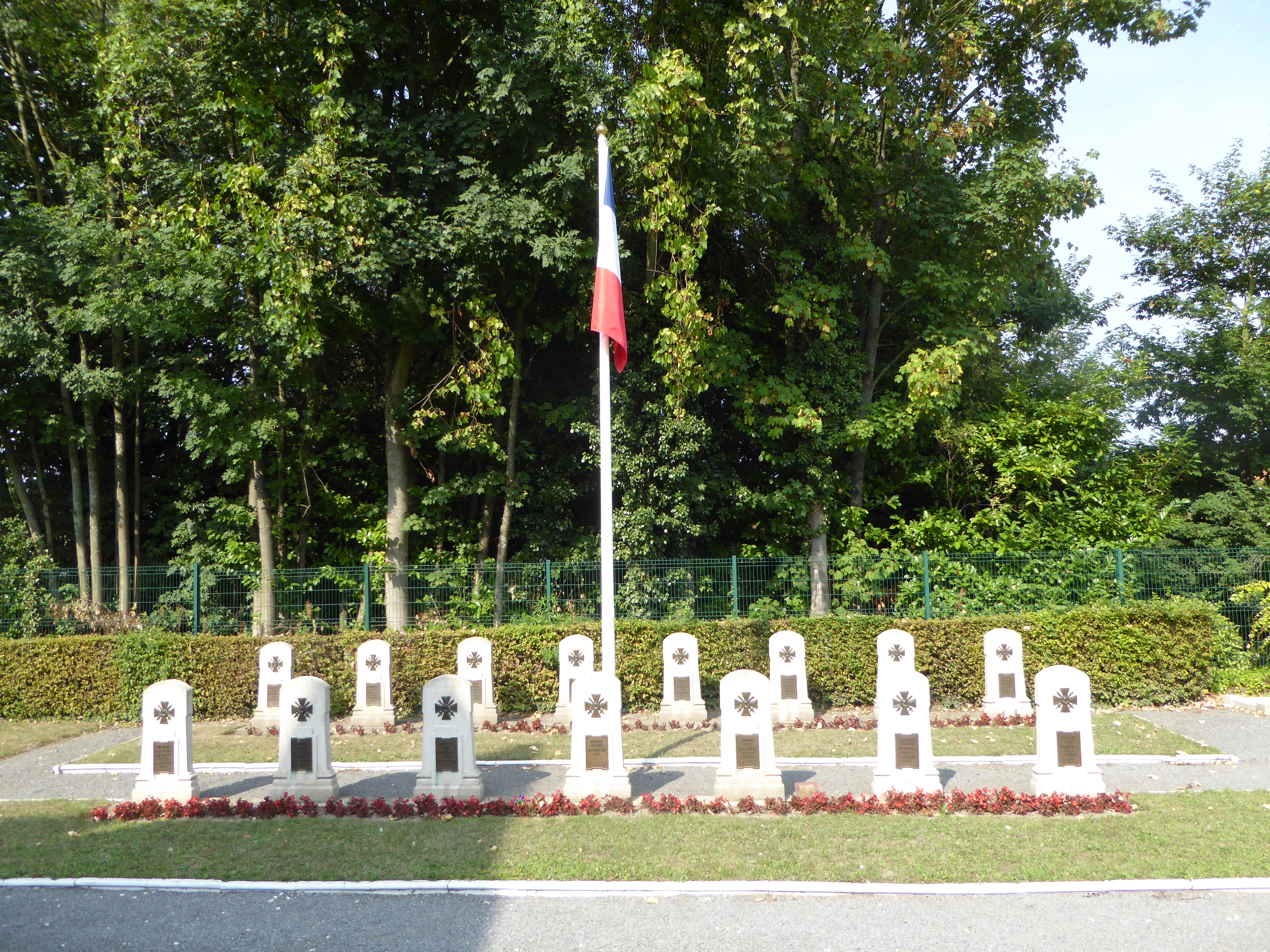 Enclos de l'église Saint-Sébastien d'Annappes - carré militaire - guerre1914-1918 d'Annappes à Villeneuve-d'Ascq, France